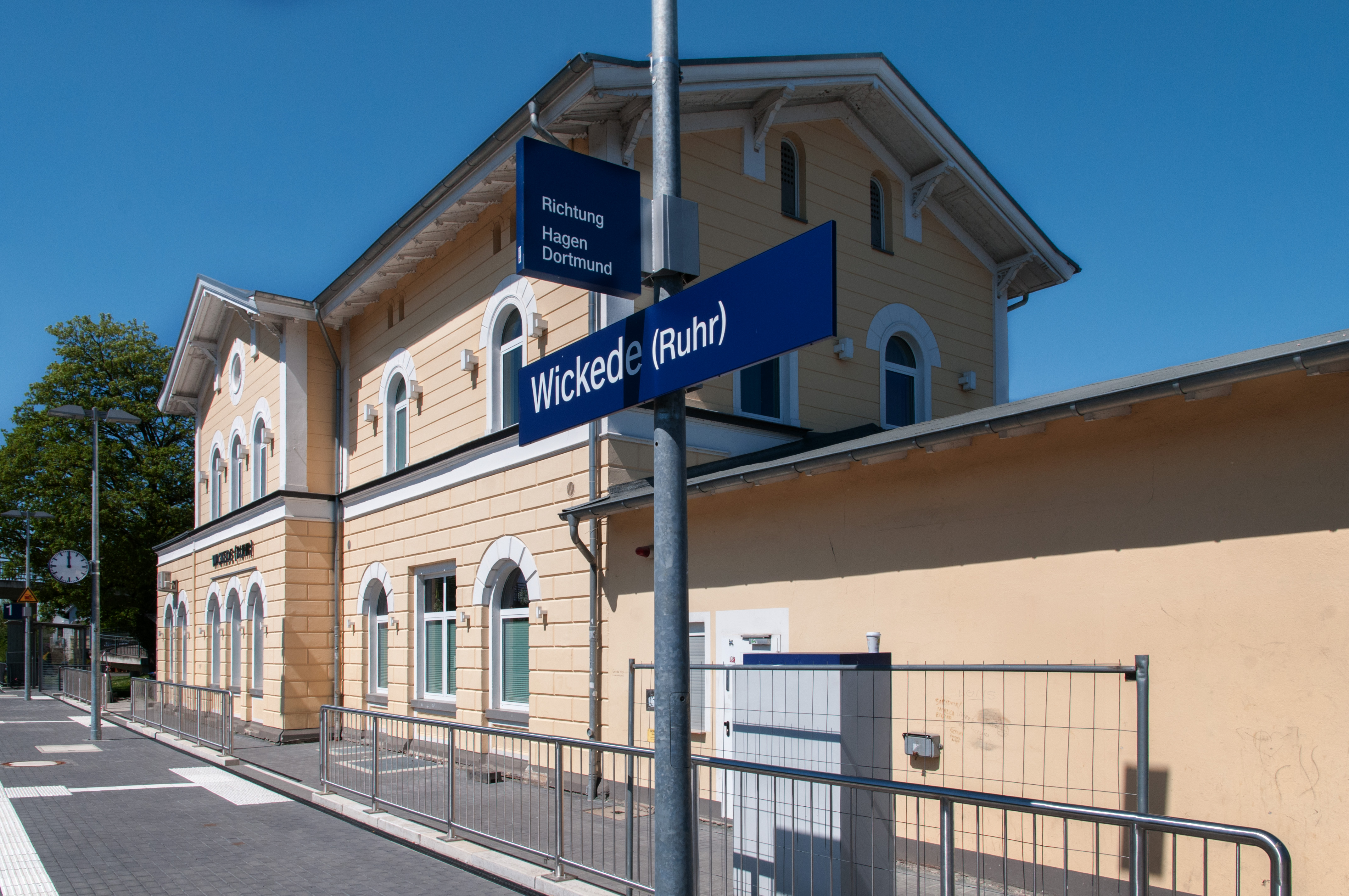 Bahnhof Wickede/Ruhr